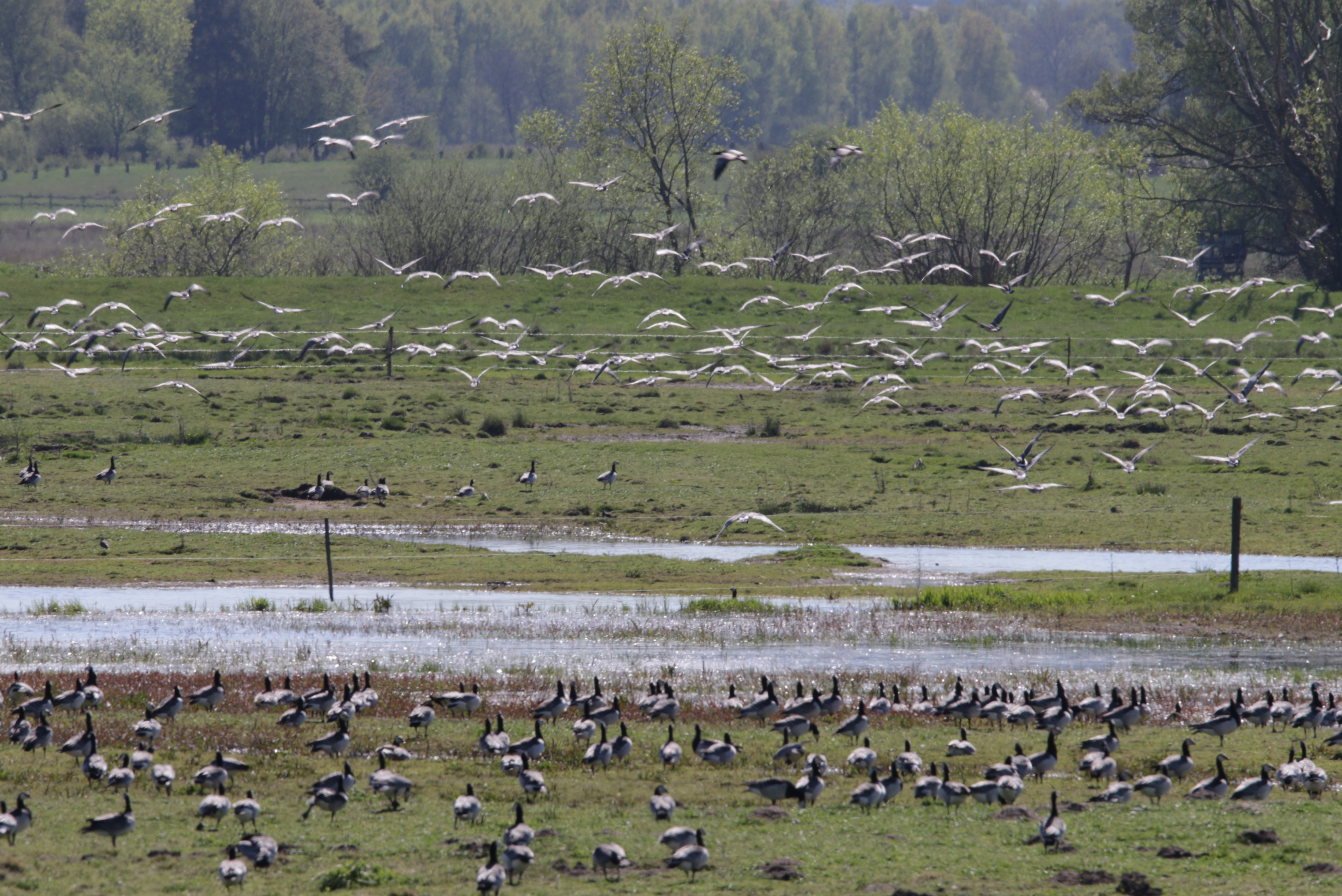 Klingavälsåns dalgång